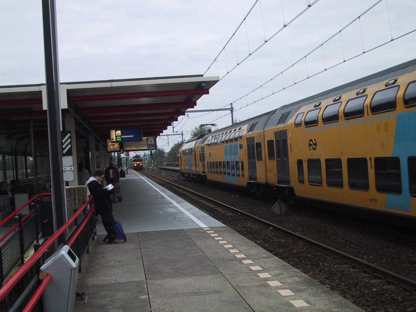 Almere Muziekwijk vanaf het peron